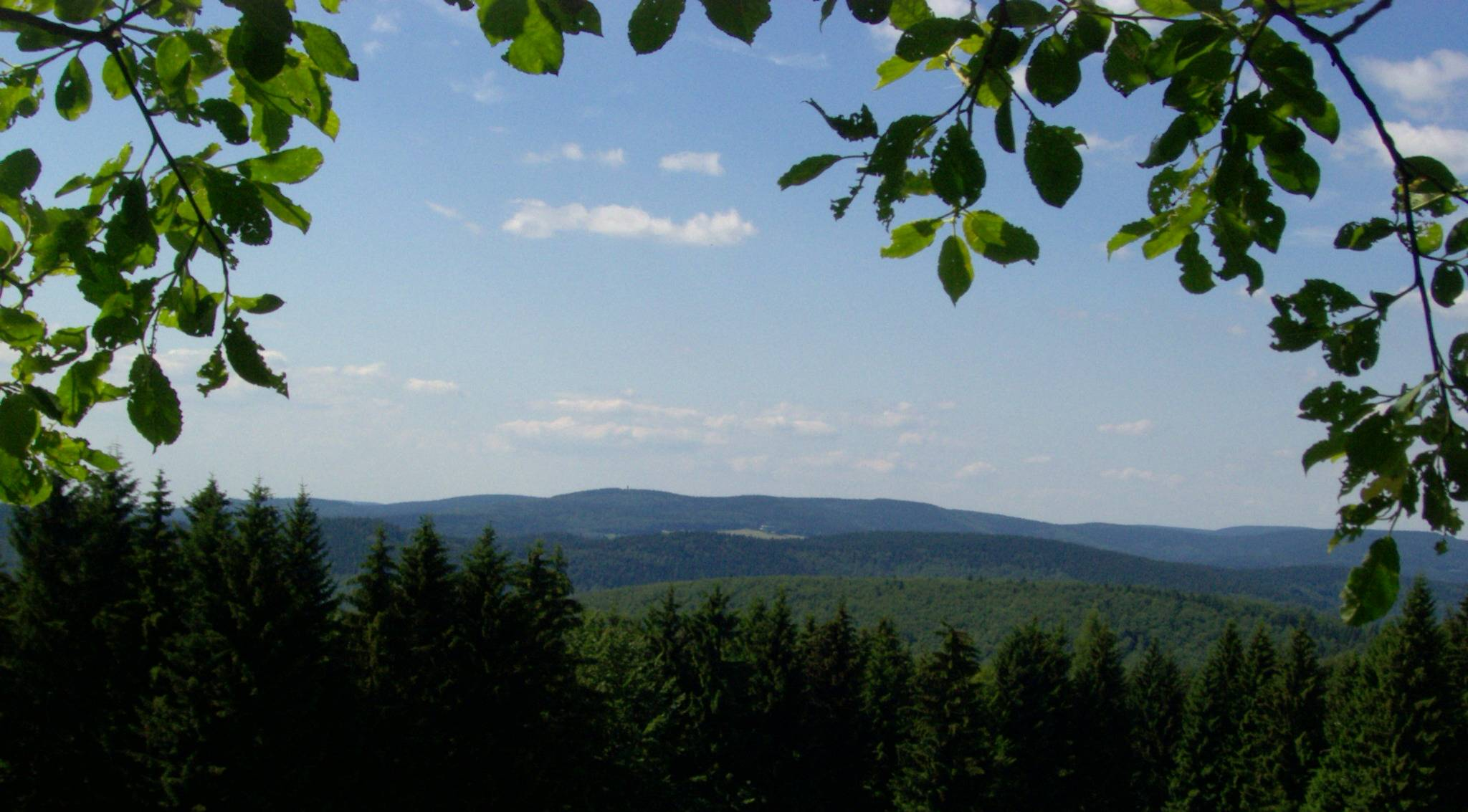 Adlersberg (849 m, links der Mitte, Turm) mit Neuhäuser Hügel (891 m, rechts der Mitte) vom Kalten Staudenkopf (768 m) aus. Die Wiese unterhalb dazwischen liegt am Stutenhaus bei Vesser. Ganz rechts der Große Eisenberg mit dem Salzberg (866 m, deutlich links davon). Hinter dem Sattel dazwischen ist der Große Beerberg (983 m, rechts) mit seinem Vor-Gipfel Wildekopf (943 m, links) erkennbar. Links des Adlersberges die zu seinem Massiv gehörenden Beerberg (808 m) und Großer Dröhberg (ca. 730 m). Vor dem Neuhäuser Hügel die Hohe Buche (749 m), davor der Sommerberg (712 m).